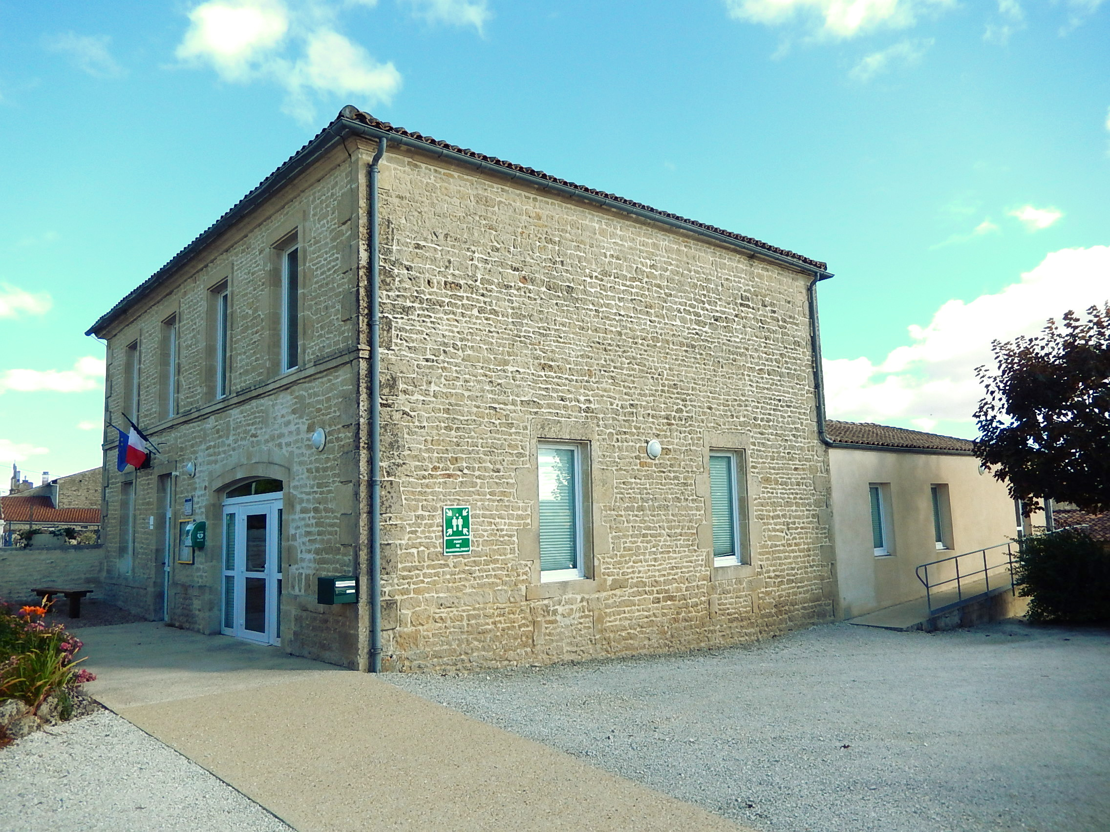 Le bâtiment qui abrite la mairie de Saint-Georges-de-Longuepierre.